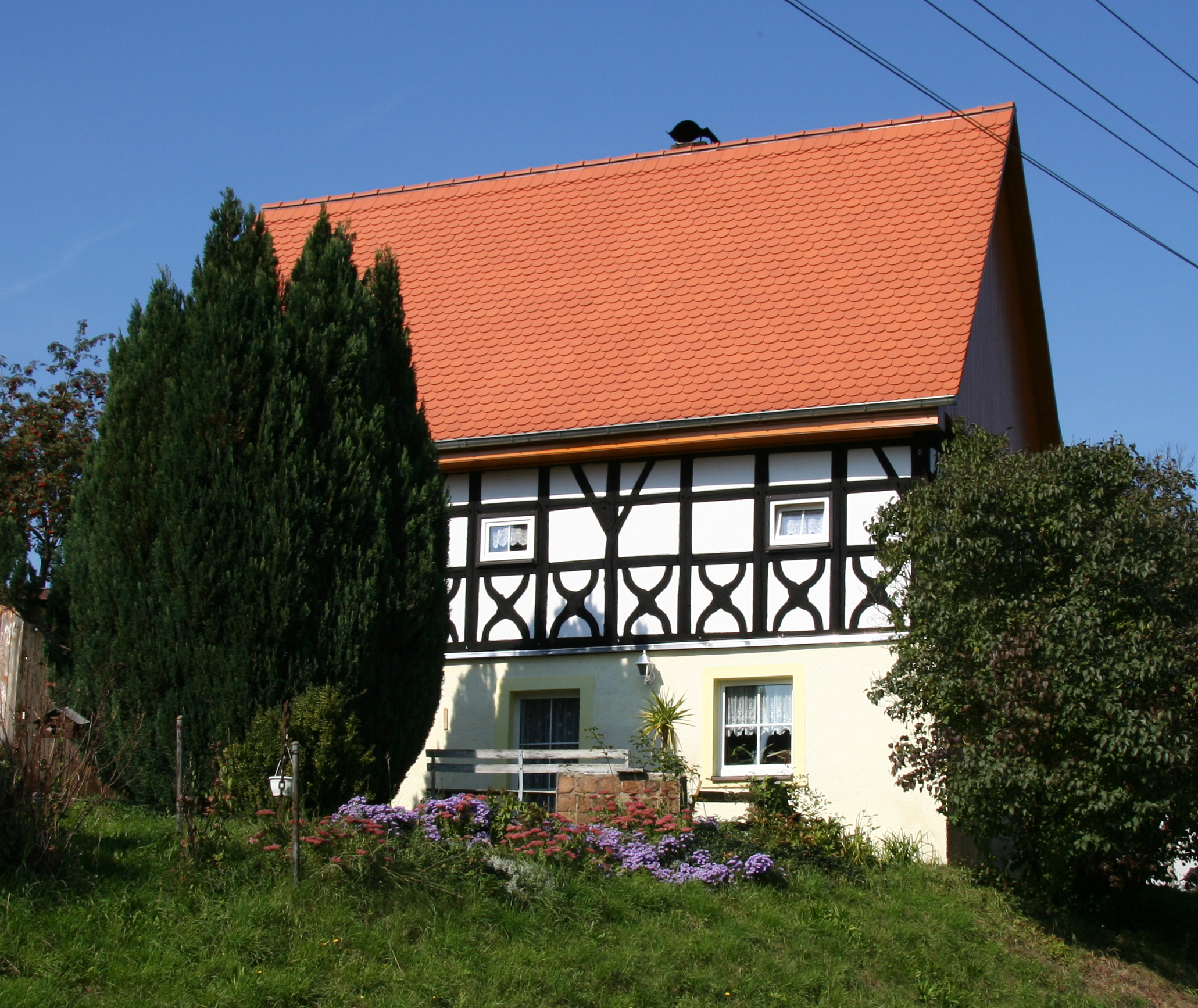 denkmalgeschütztes Haus in der Dittmannsdorfer Strasse im Ortsteil Dittmannsdorf von Penig